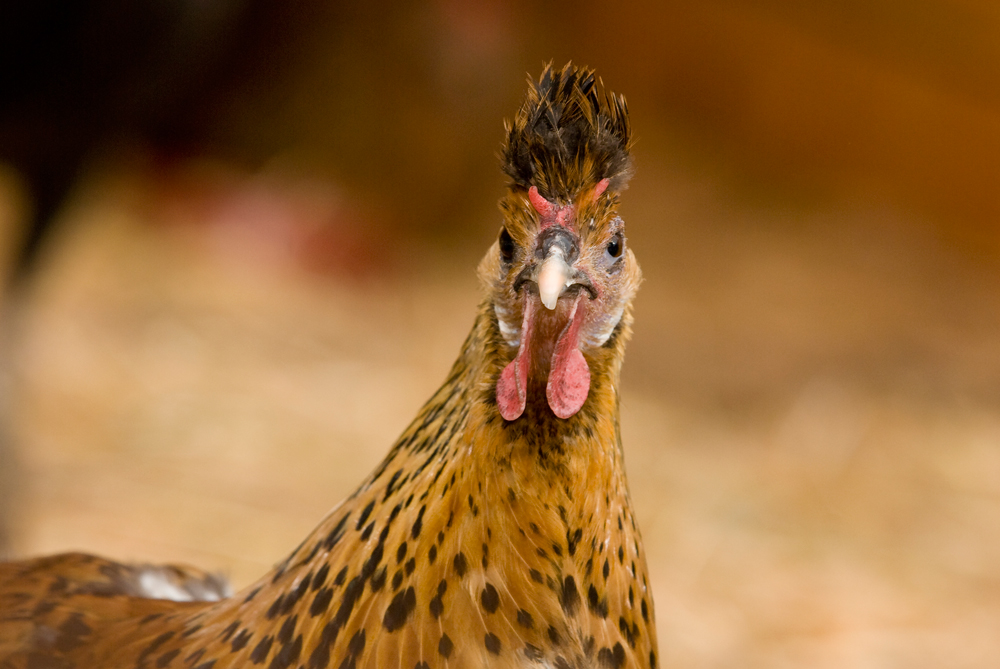 Appenzeller Spitzhauben Hanhn